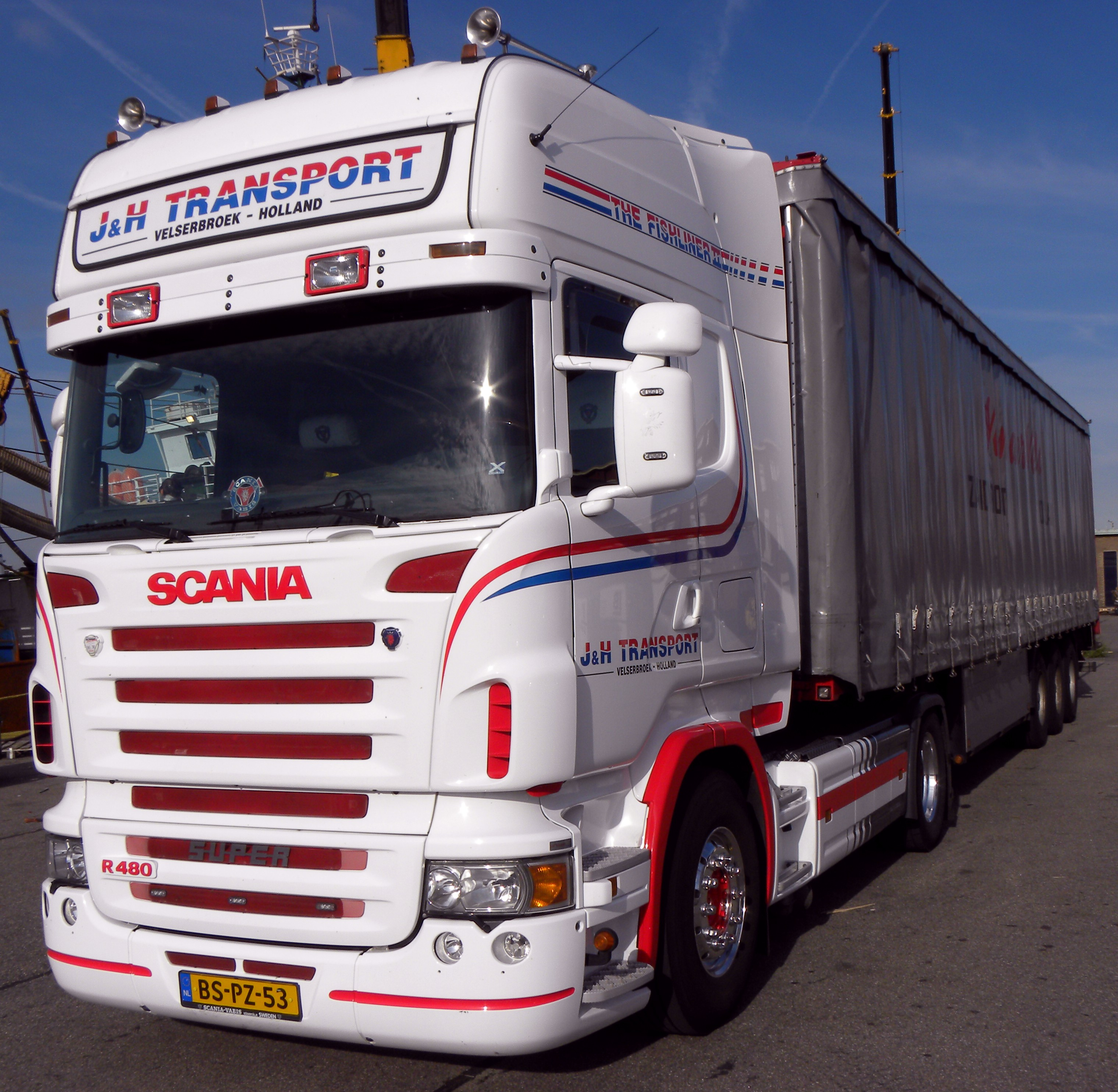 Scania R 480 J & H Transport Velserbroek Holland -seen in ijmuiden